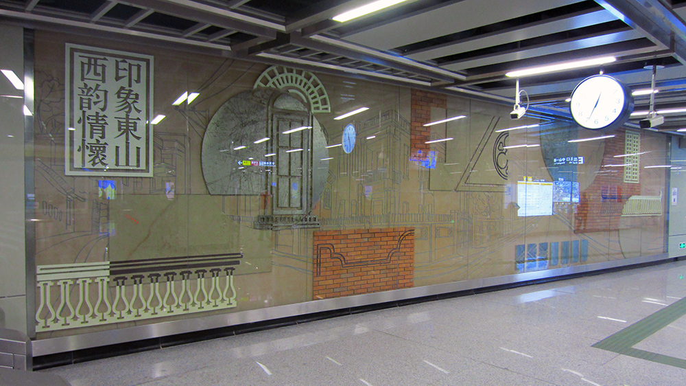 東山口文化藝術牆